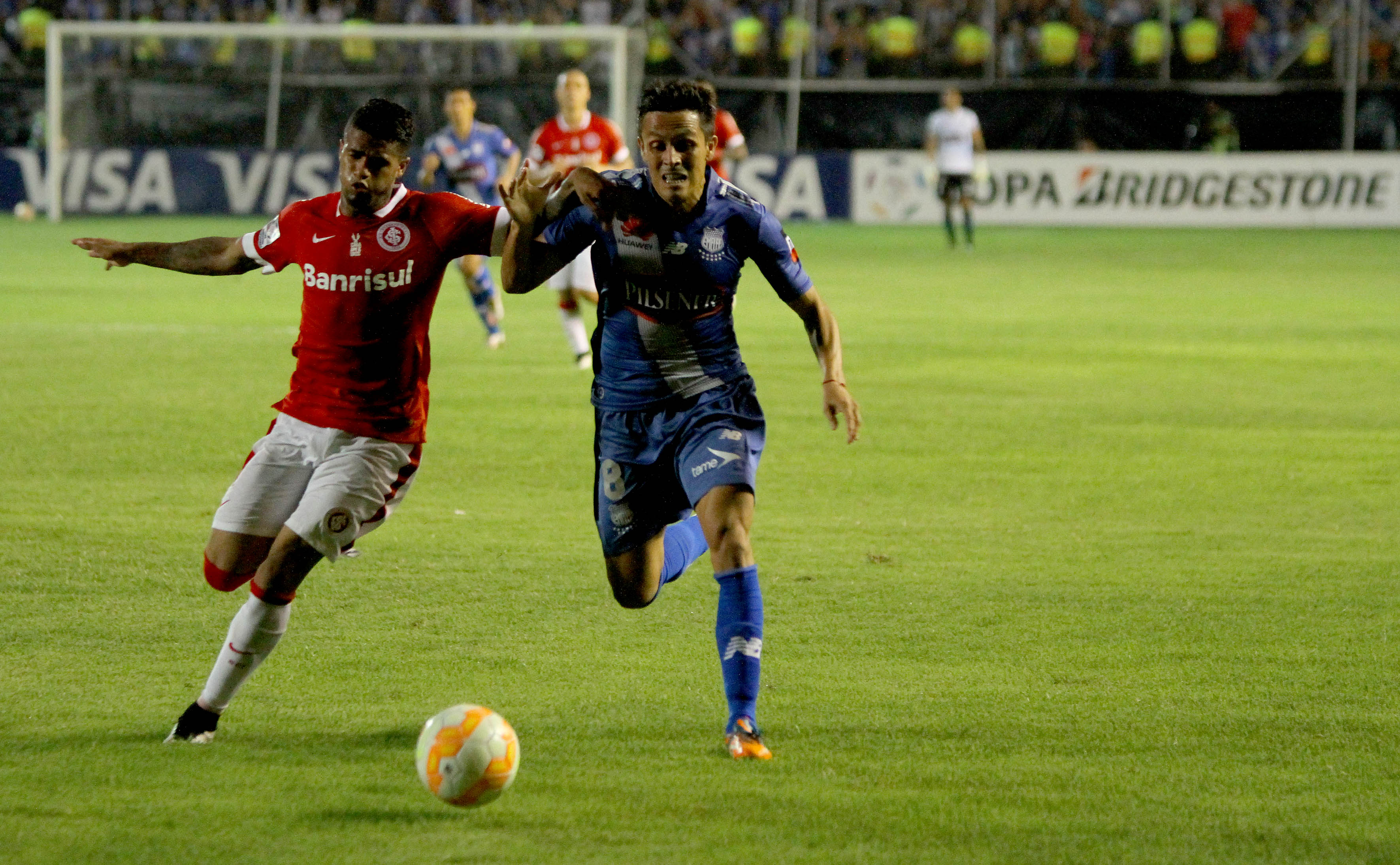 Guayaquil, Miércoles 18 de marzo del 2015 (ANDES).-Emelec se enfrenta a Internacional de Brasil por la Copa Libertadores Foto:César Muñoz/ANDES